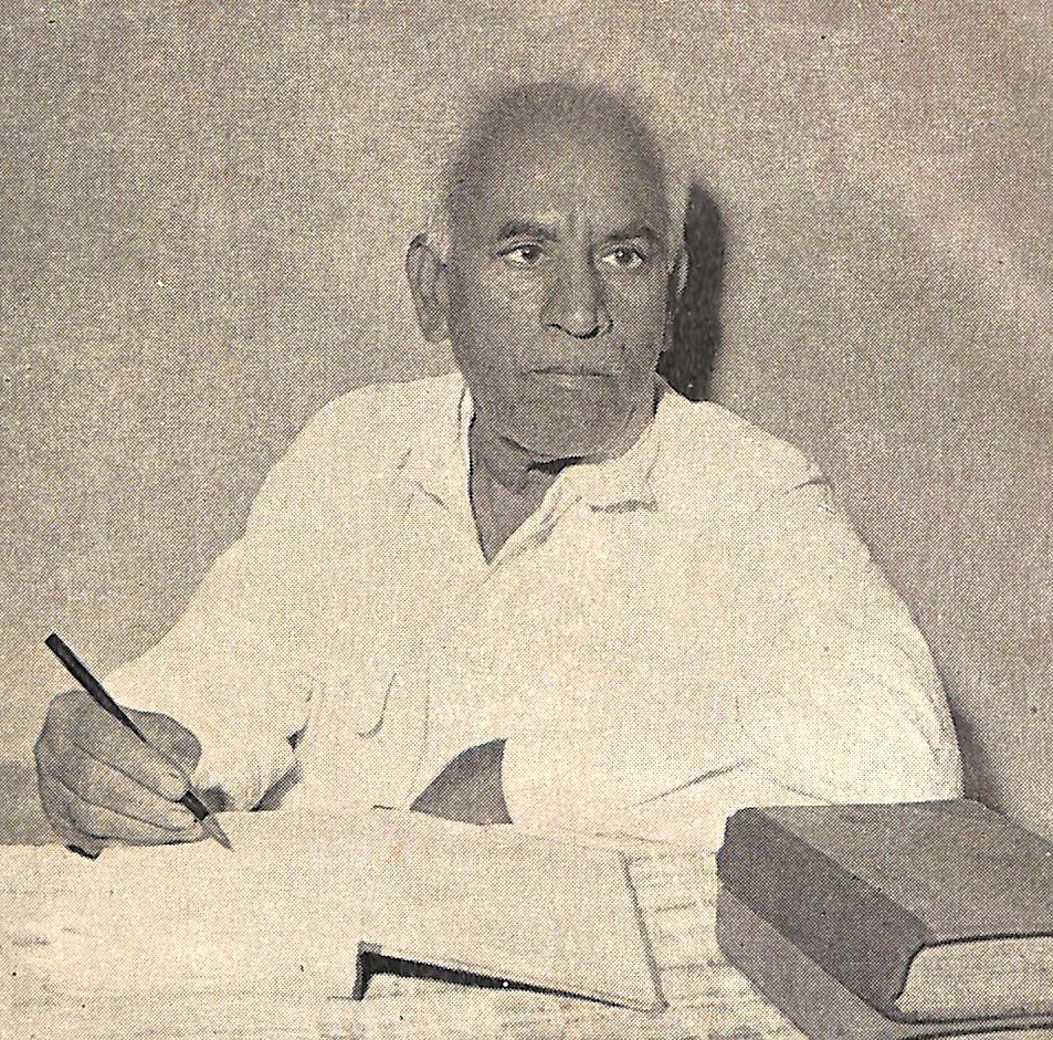 गजानन गोविंद नाईक , काका नाईक , अणजूरकर